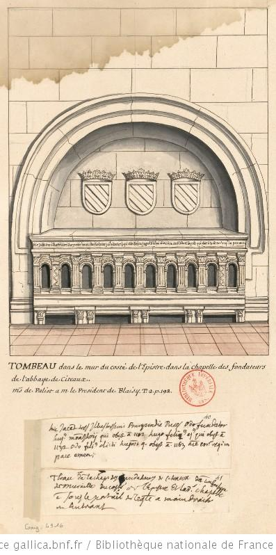 reproduction faite pour Gaignières, tombeau de Eudes, eudes II et III ducs de Bourgogne.